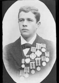 Wilhelm Mauseth, norsk skøyteløper, norgesmester 1895